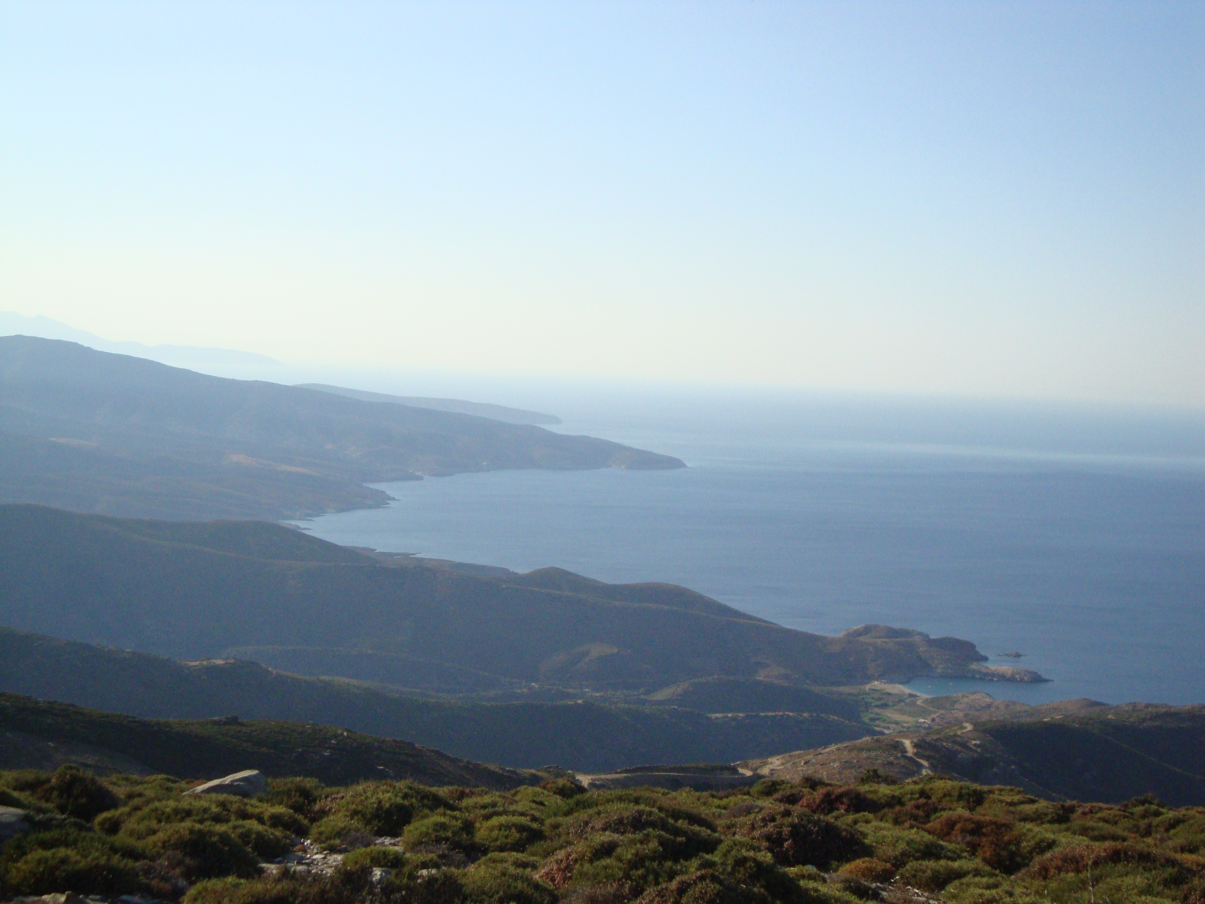 Ακτές της Άνδρου